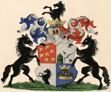 Kosodavlevi suguvõsa aadlivapp